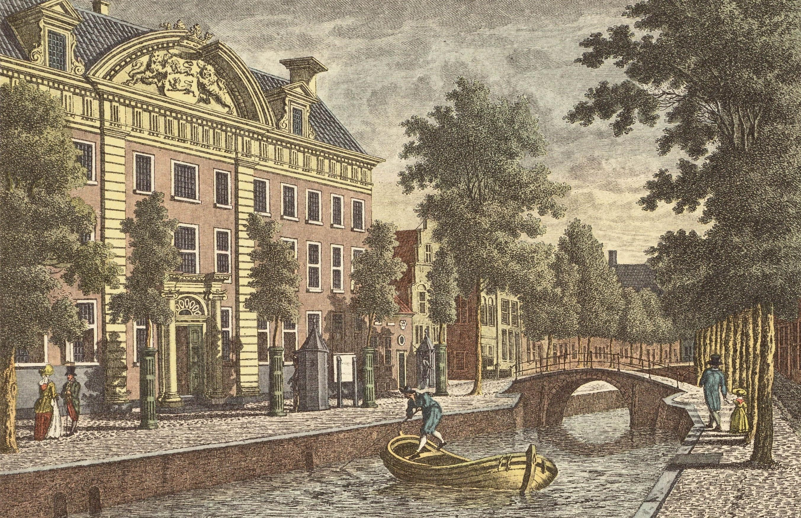 It provinsjehûs fan Fryslân yn Ljouwert